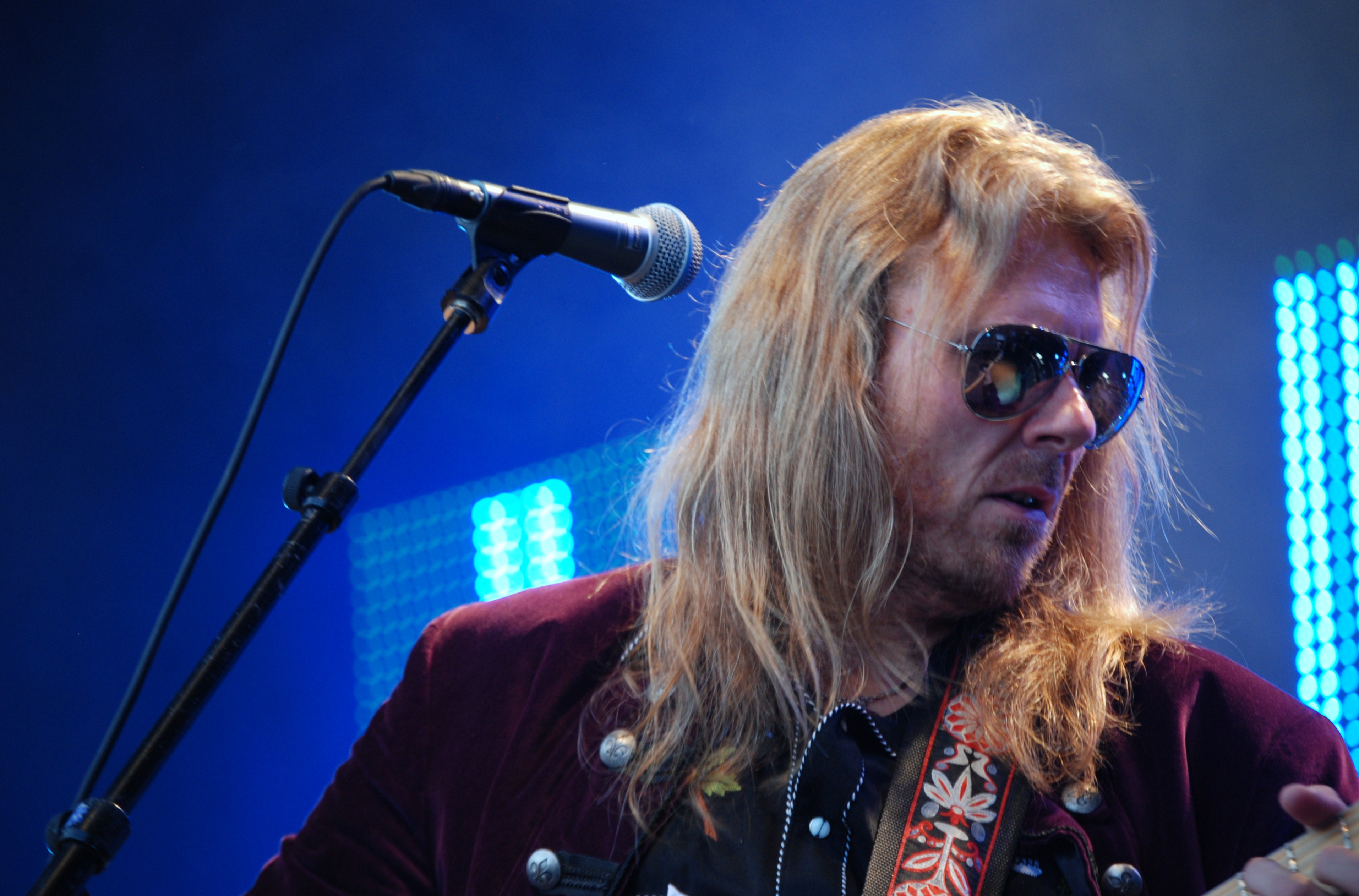 Lars Håvard Haugen fra Hellbillies under en konsert i Langesund juli 2011.